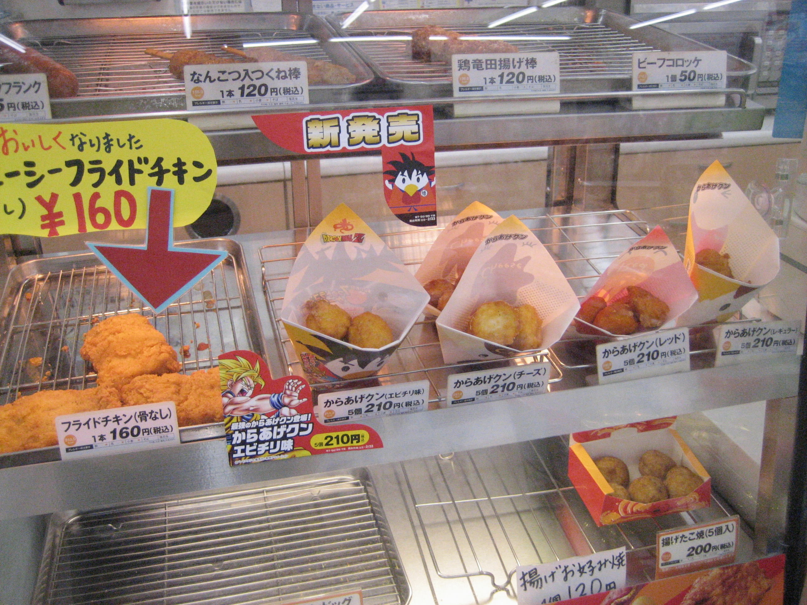 日本にあるコンビニエンスストアチェーンのローソンの店頭で販売されているファーストフード。ケースの中央にあるのは「からあげくん」と呼ばれているチキンナゲットの様な食べ物。